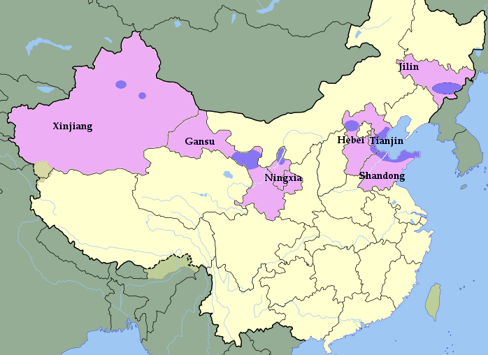 carte du vignoble chinois